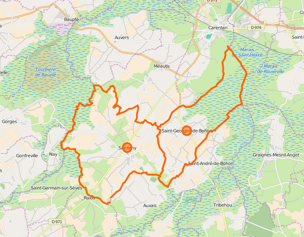 Carte de la commune nouvelle et de ses communes déléguées